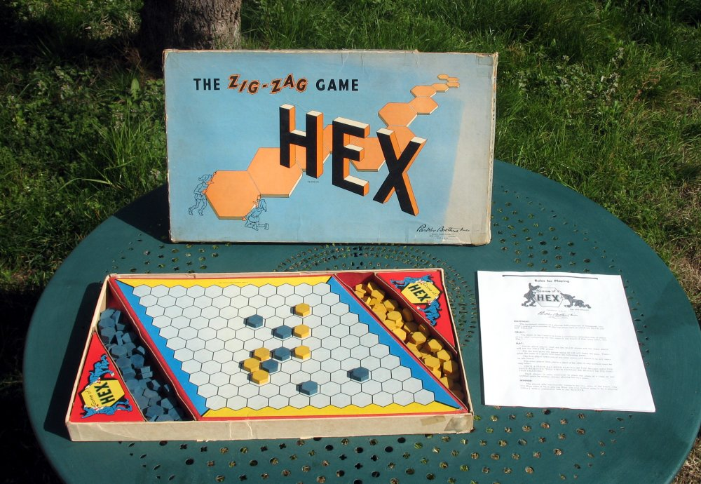 Hex sur la table verte